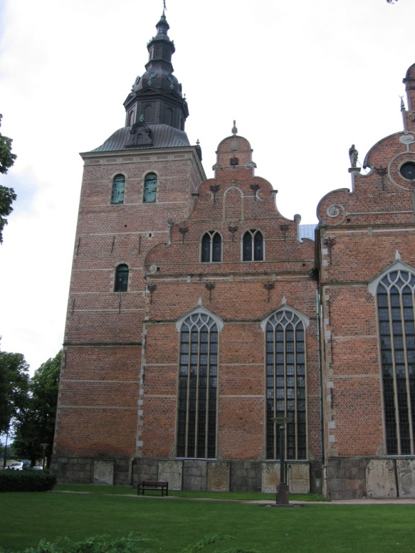 Trefaldighets kyrkan